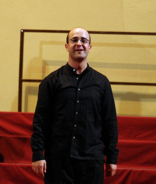 Josu Elberdin. Musikaste 2006. Argazkilaria: Arizmendi